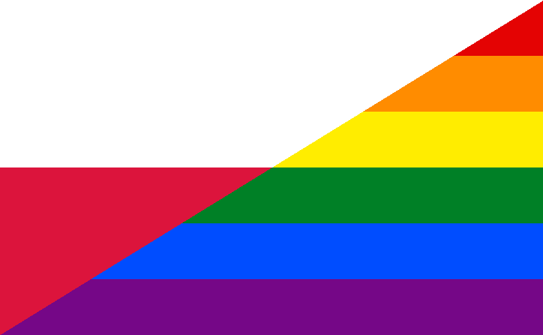 Bandera gay Polonia